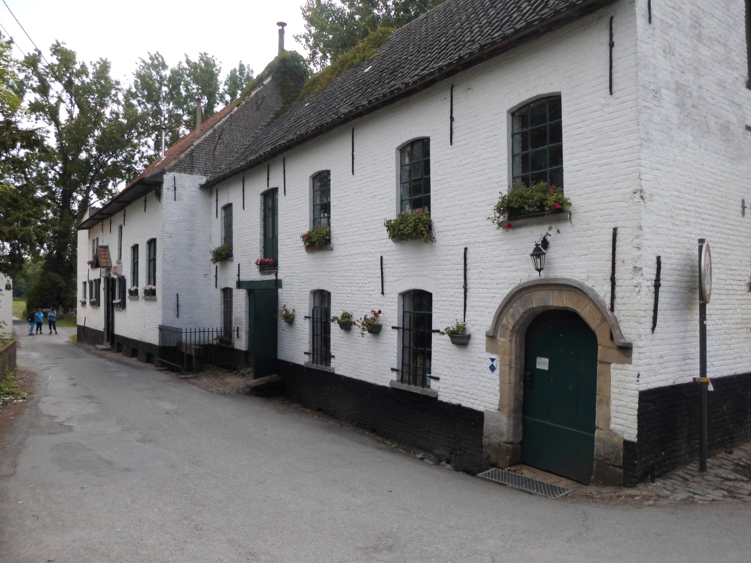 De IJzerkotmolen (watermolen) - Galerijpad - Sint-Maria-Latem - Zwalm - Oost-Vlaanderen - België